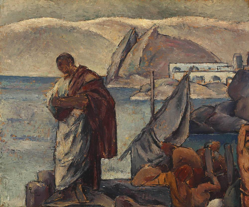 Ion Theodorescu-Sion - Ovidiu în exil, ulei pe carton, 36,5x43,5 cm, semnat și datat stânga jos, cu negru, TeoSion, 1915.